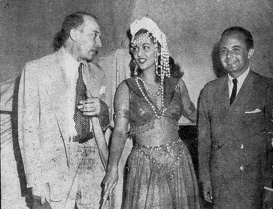 Legenda da foto: "Raul Bopp, cônsul do Brasil em Los Angeles, em companhia de Maria Montez e Jorge Guinle, representante do D.I.P. em Hollywood. O mais recente filme de Maria Montez é "A Branca Selvagem", para a Universal." Publicado na revista A Scena Muda, v.23, n.43, 1943, pág. 9.